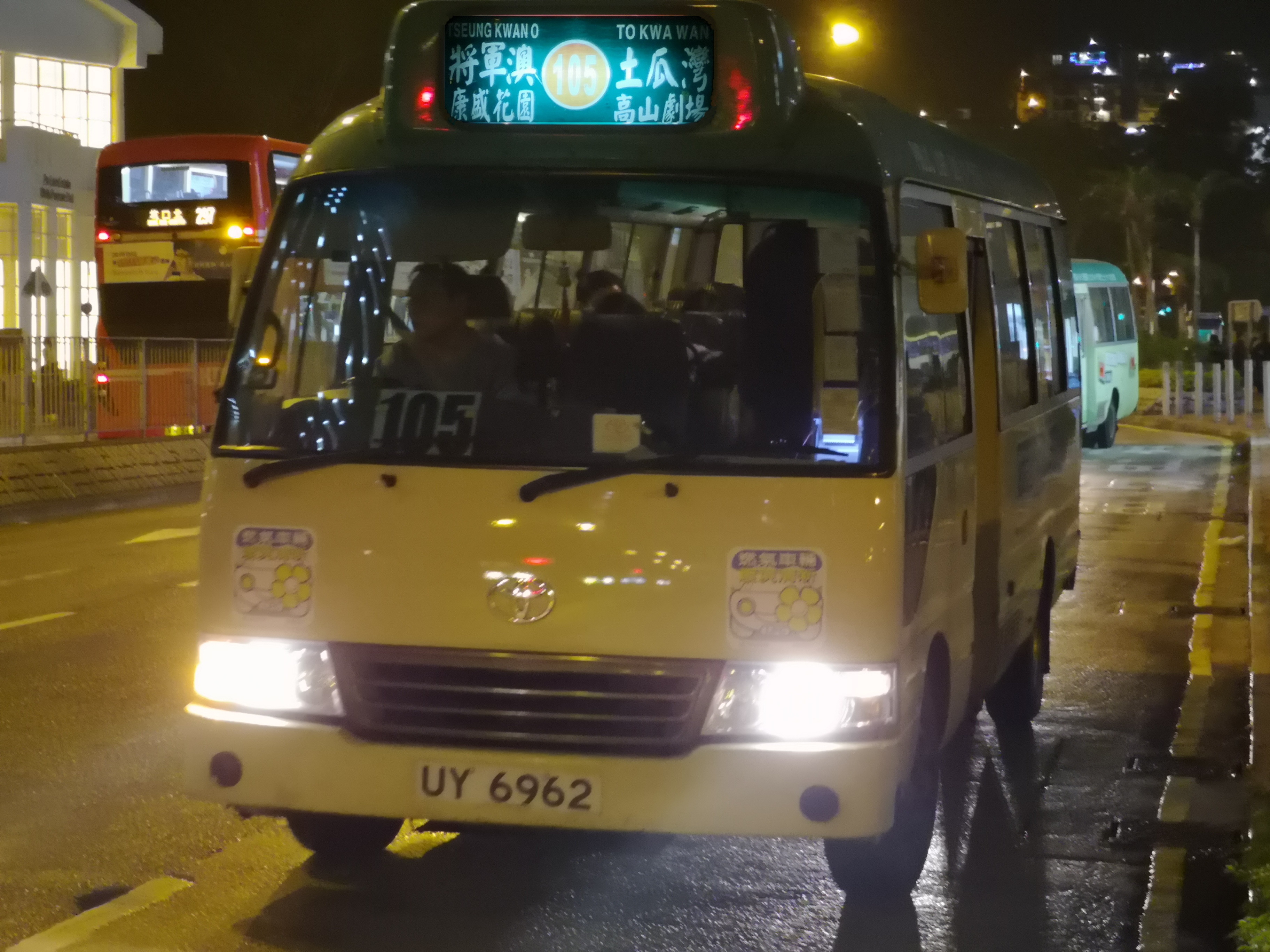 中文（中国大陆）: 小巴UY6962的照片